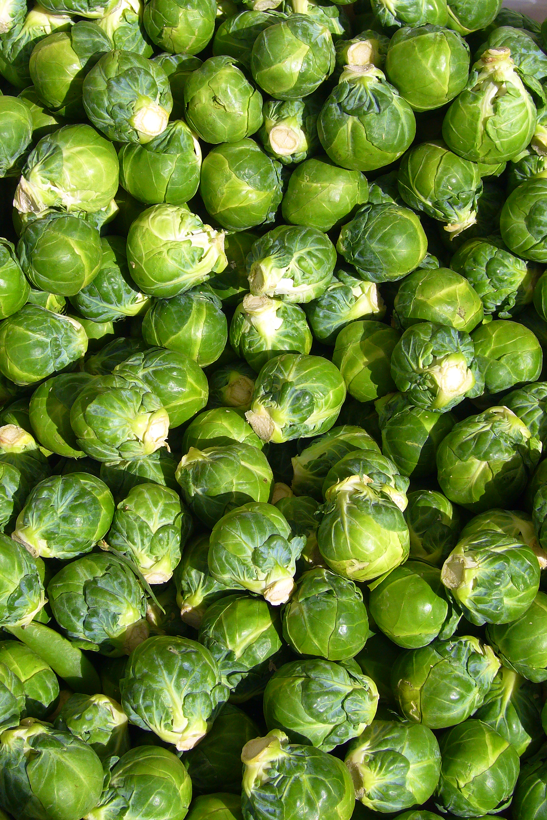 Brussels Sprouts